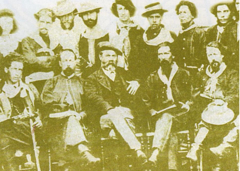 Oficiales y soldados de la Revolución de las Lanzas